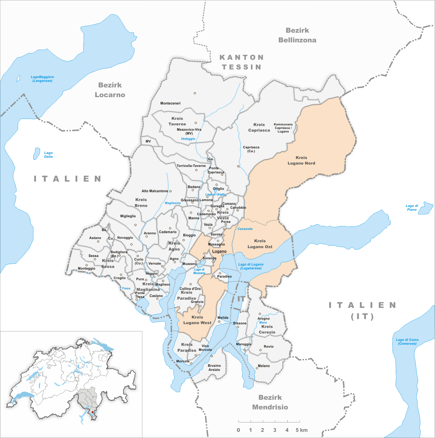 Municipality Lugano